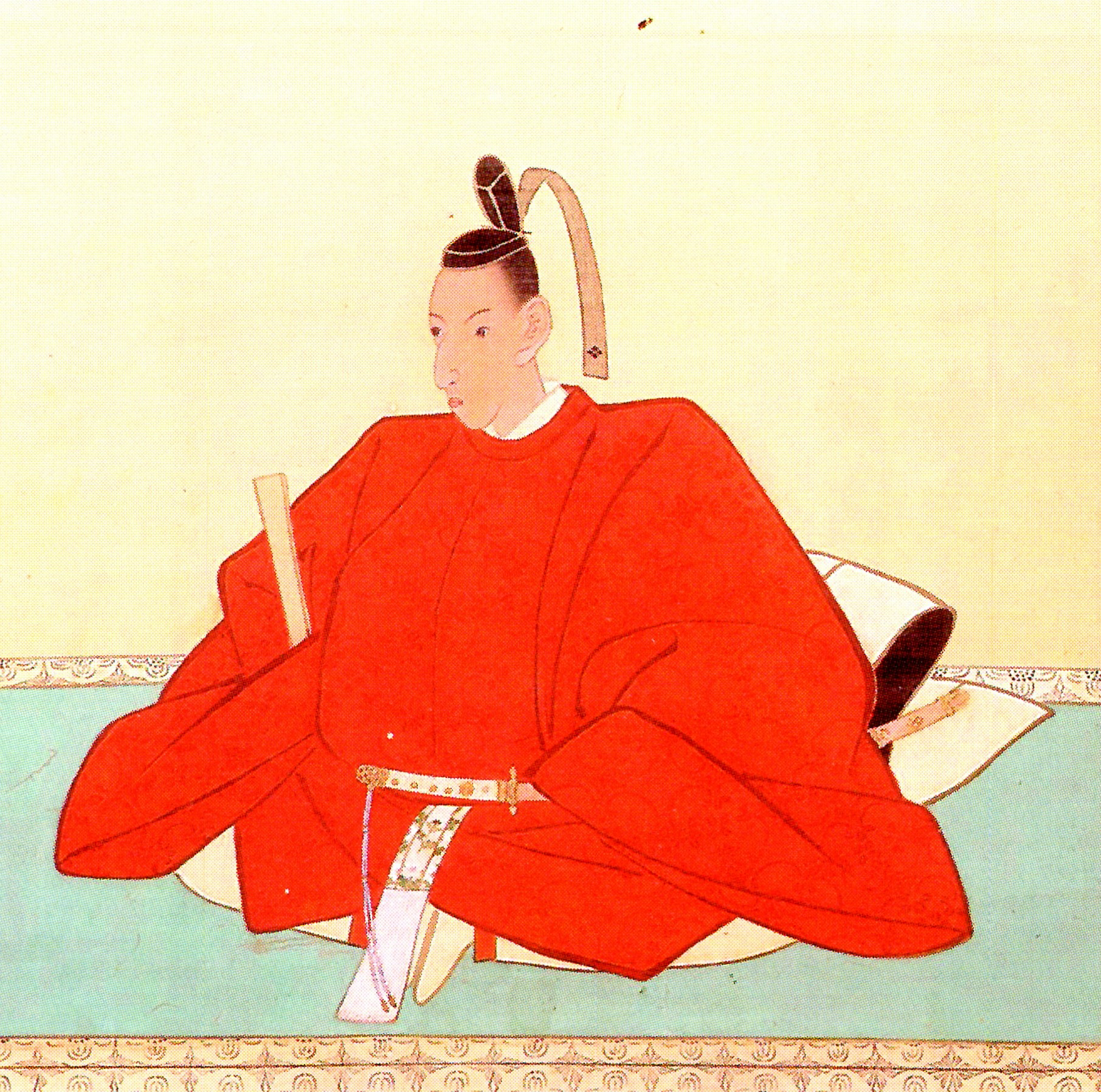 岡部長発の肖像。